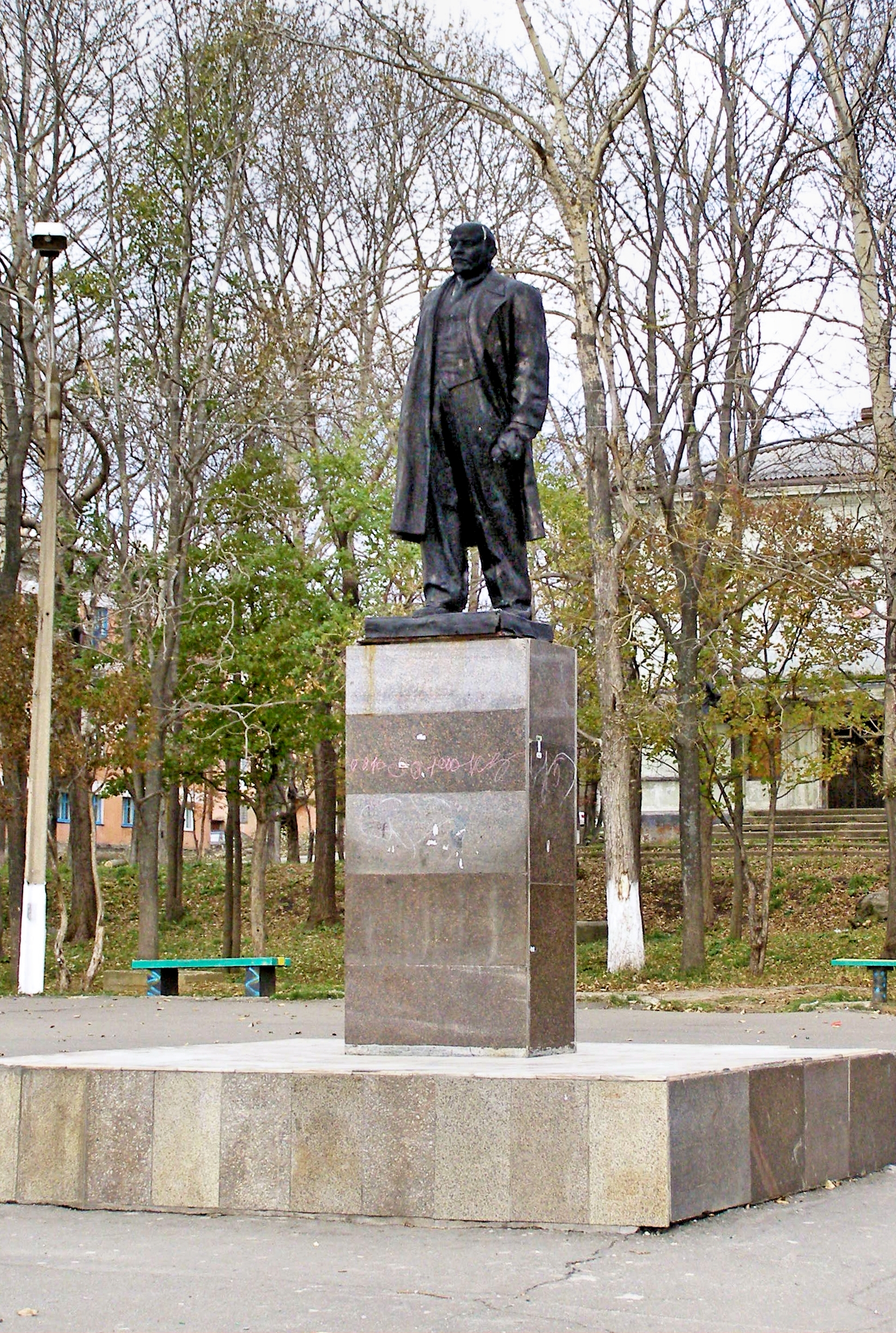 Памятник В.И. Ленину: городская площадь, Долинск, Долинский район, Сахалинская область